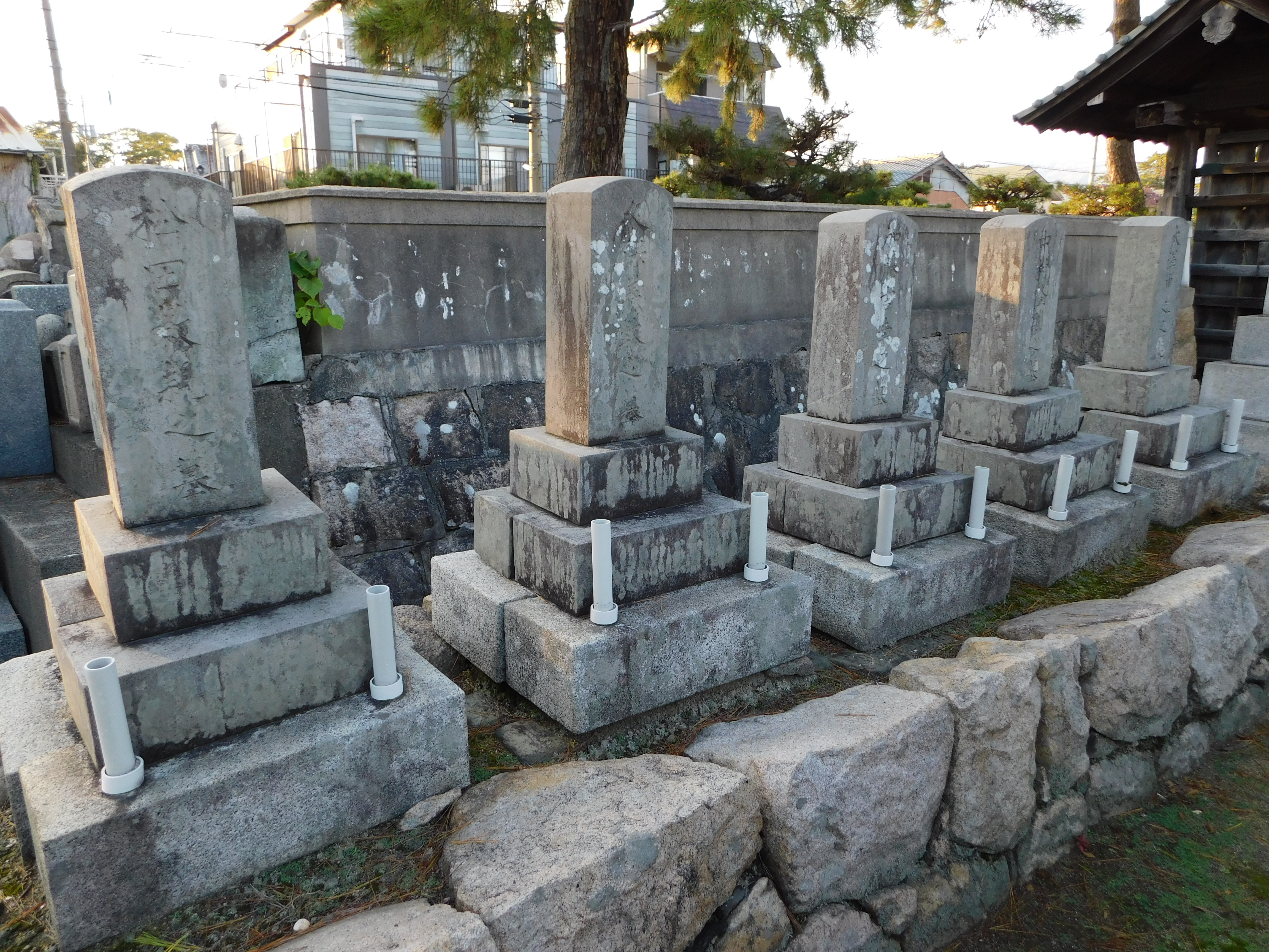 鞠山藩士5名の墓、明治元年に藩政を専横しようとした家老を殺害した、1名病死、4名切腹。福井県敦賀市来迎寺。